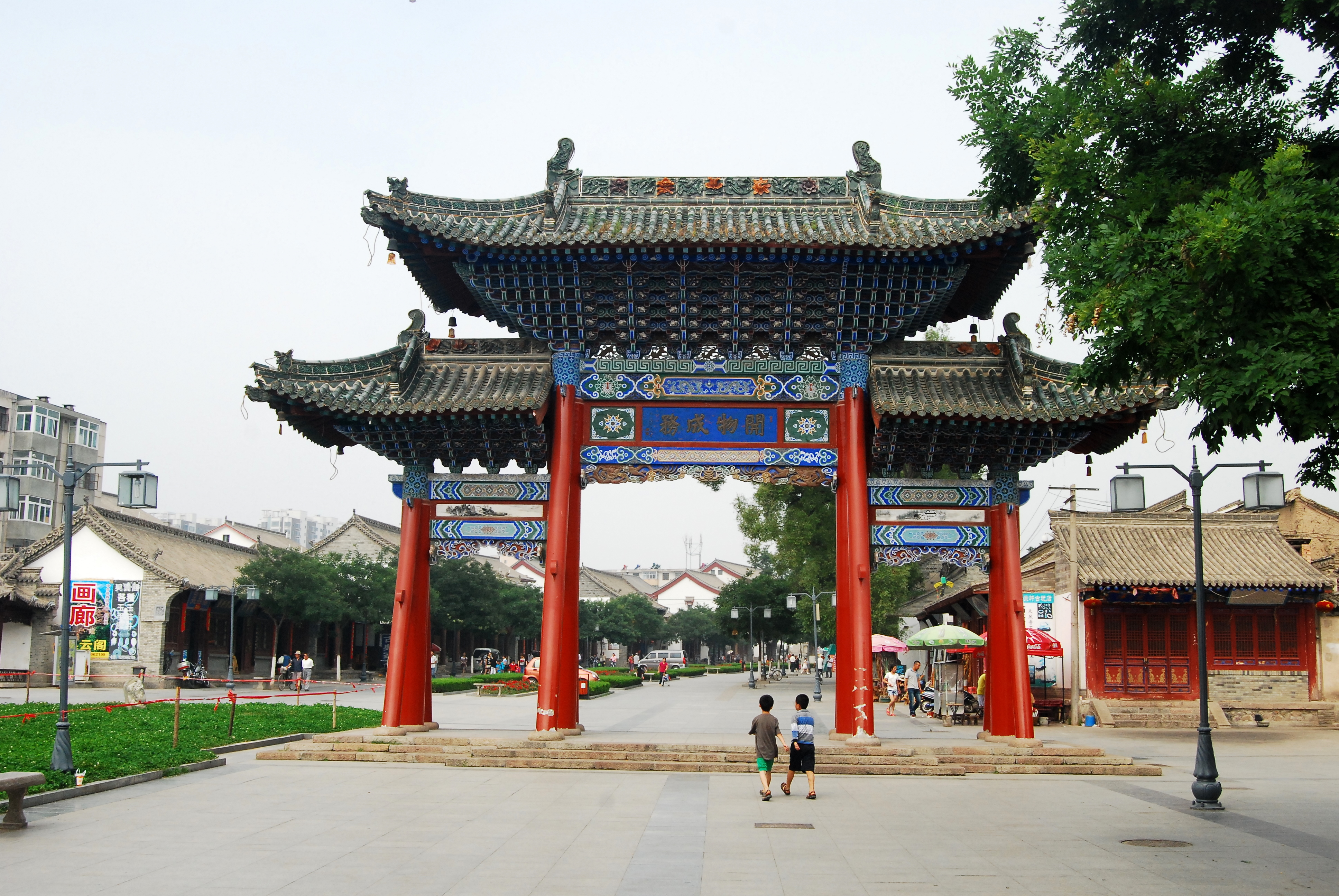 伏羲庙牌坊